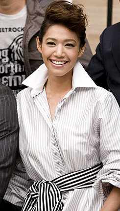 นายกฯ ถ่ายปกแพรว ฉบับเดือนกันยายน2552 9สิงหาคม2552 (The Official Site of The Prime Minister of Thailand Photo by พีรพัฒน์ วิมลรังครัตน์)